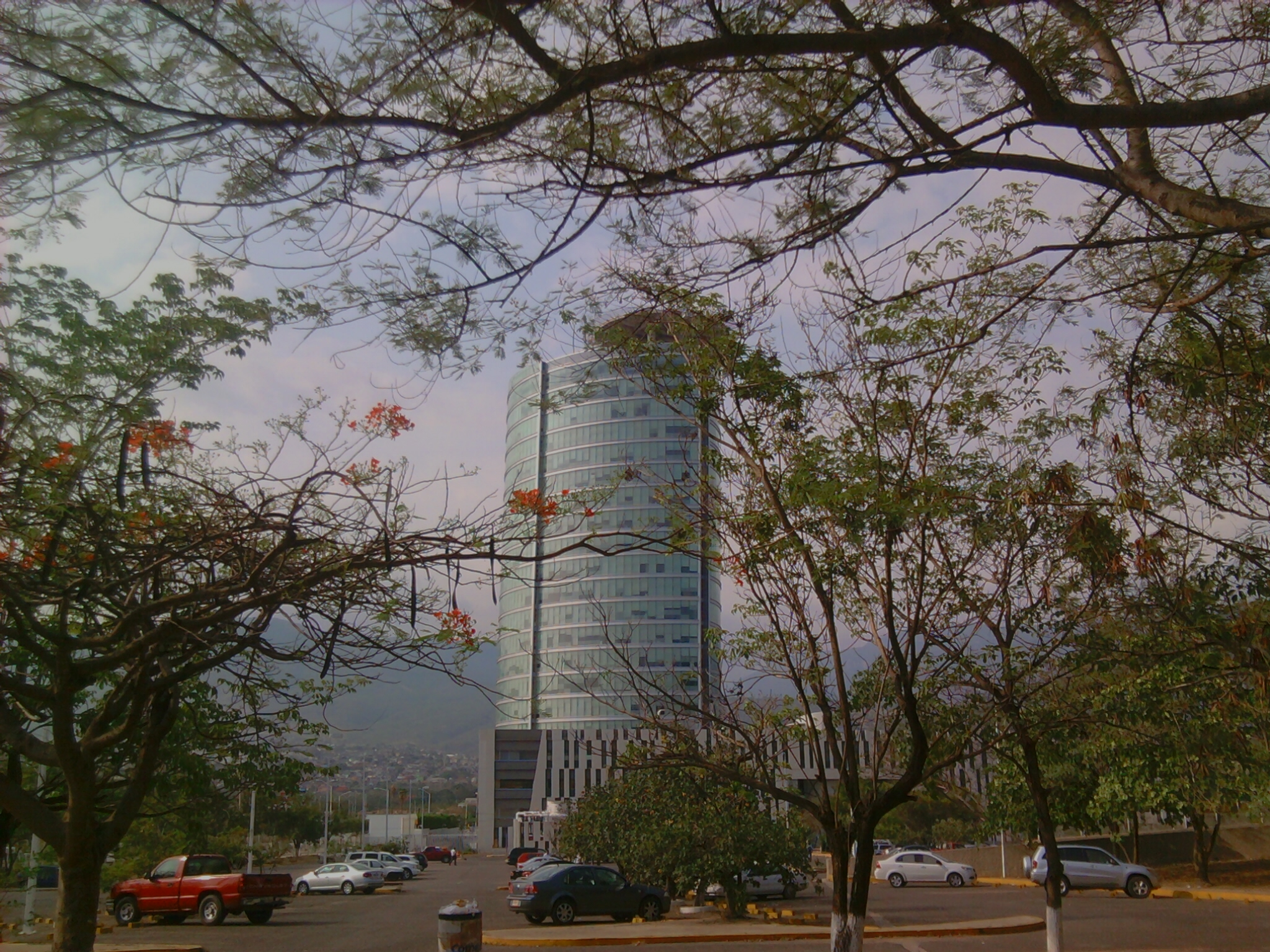 Torre Chiapas o Mesoamericana en Tuxtla Gutiérrez, Chiapas. México